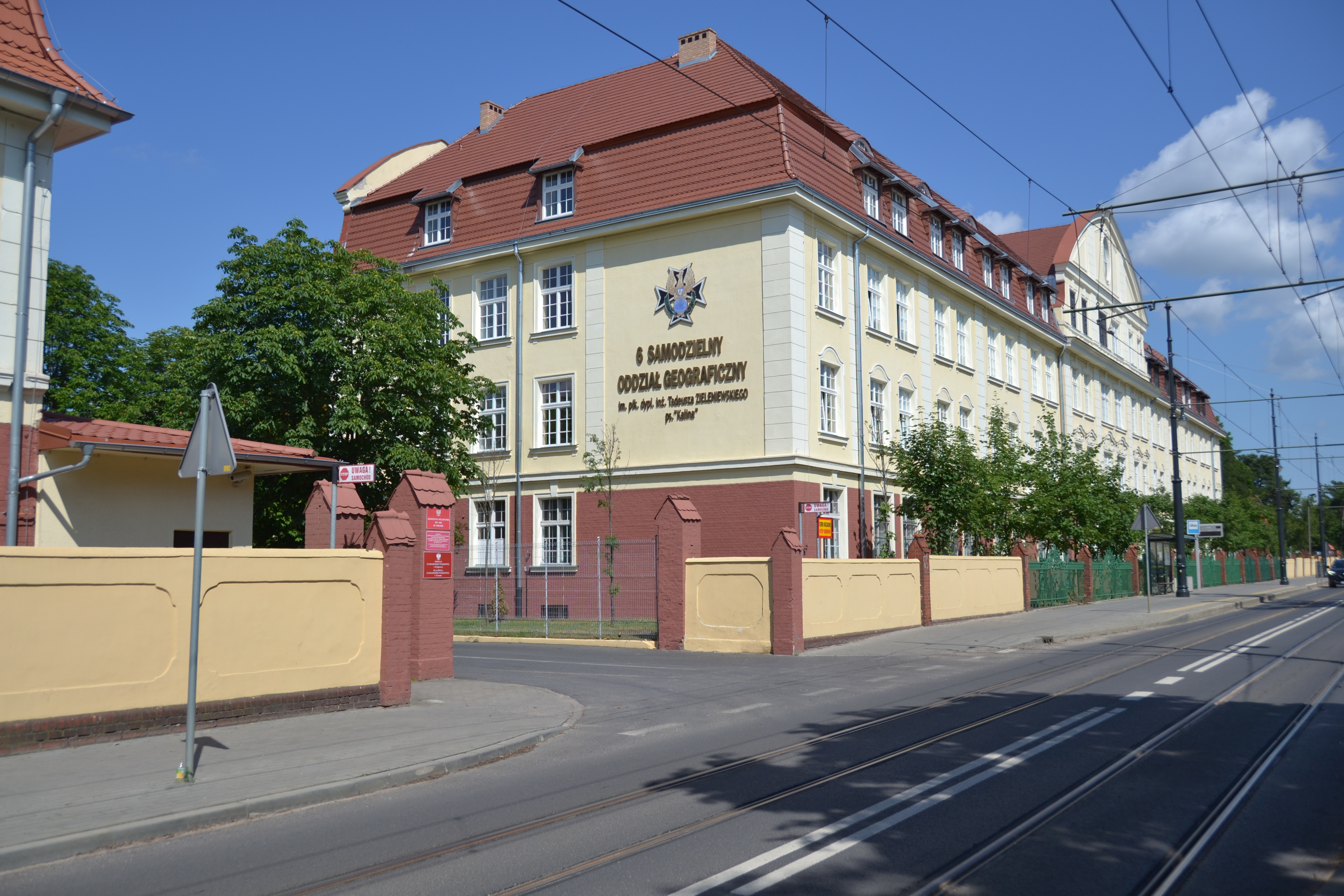 Widok od ul. Sienkiewicza na ścianę koszar 6. Samodzielnego Oddziału Geograficznego w Toruniu